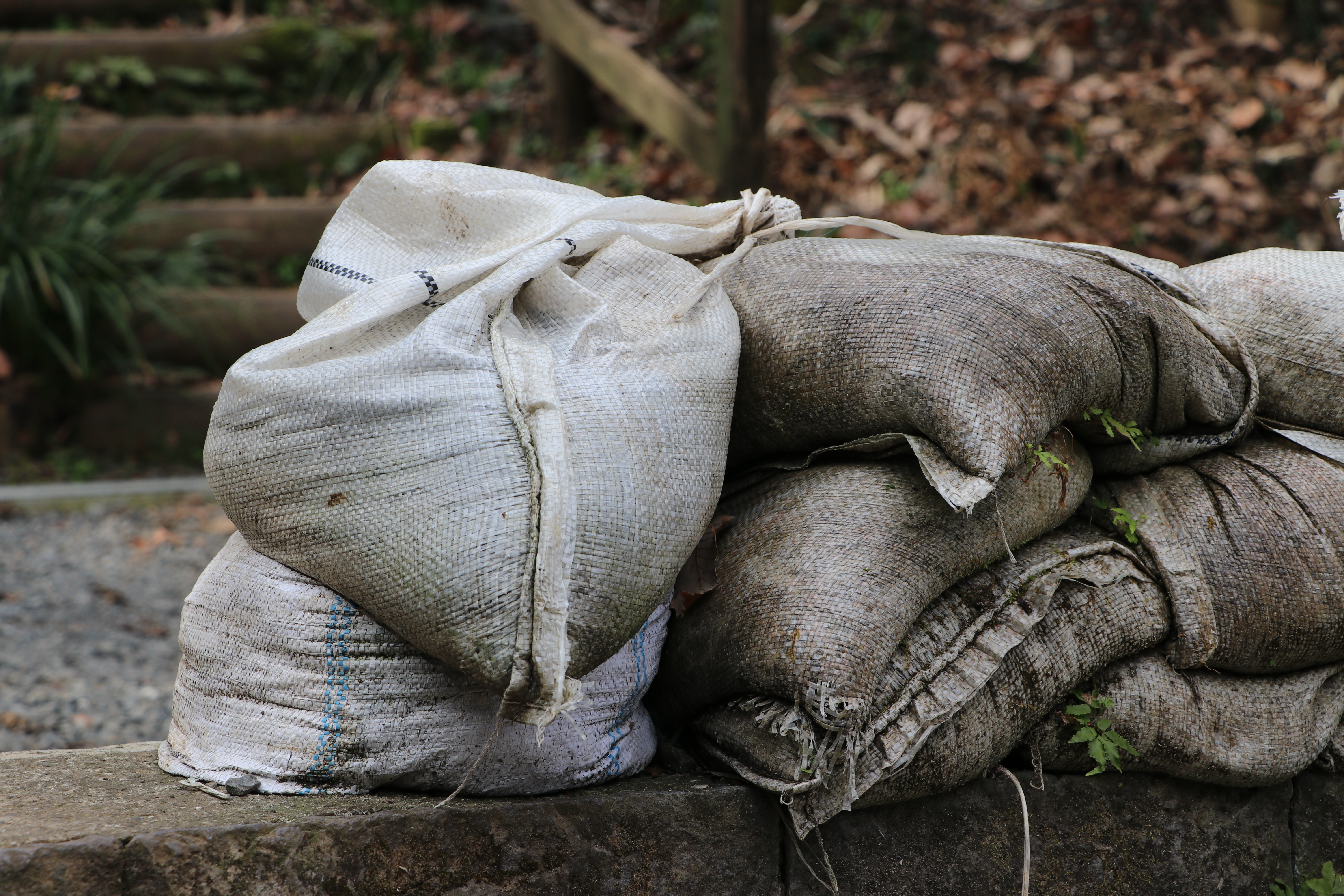 令和元年東日本台風による斜面崩壊のため生田緑地北口に設置された土嚢